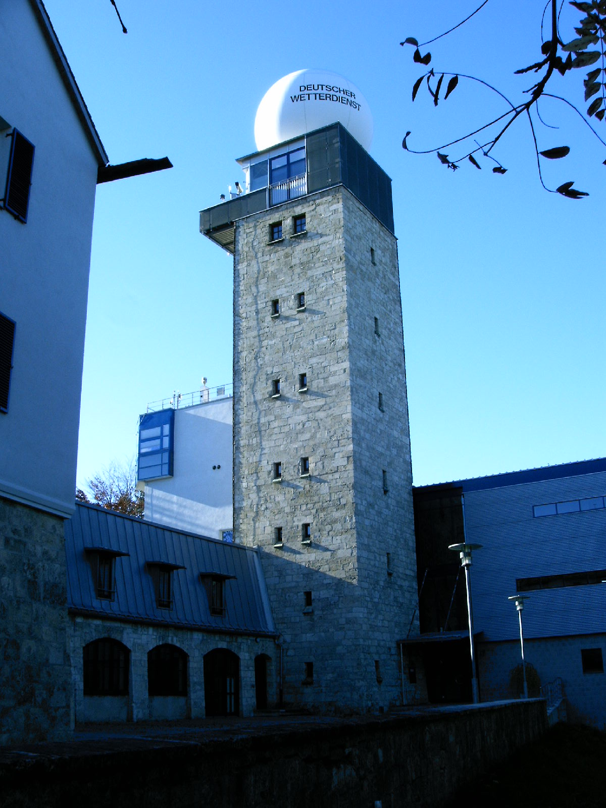 Hohenpeißenberg Observatorium Turm 2